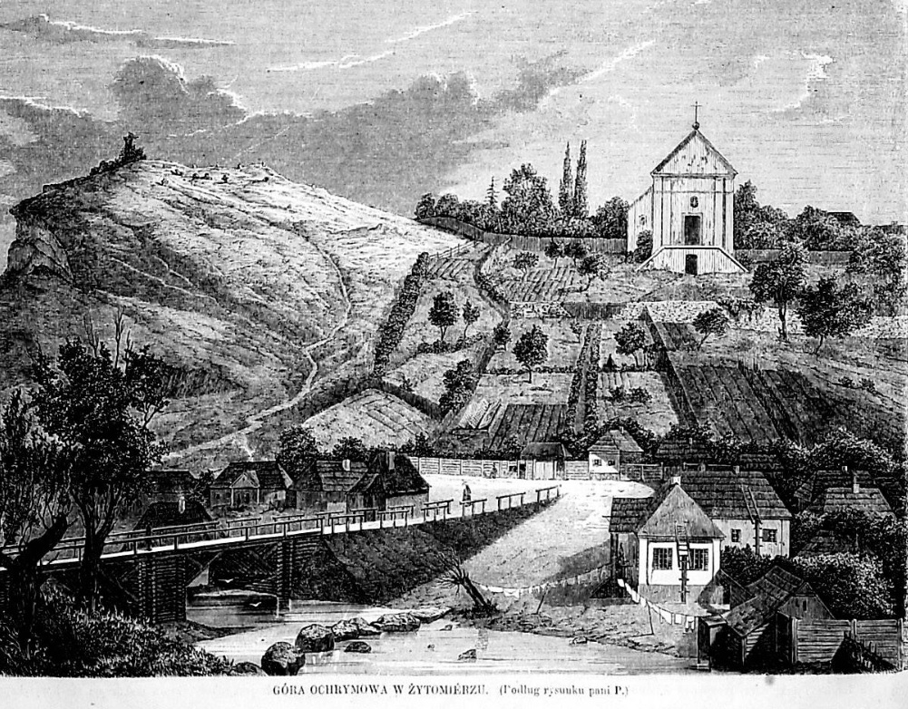 Охрімова гора у Житомирі. Гравюра Яна Стифі (1839-1321) . З щотижневика "Tygodnik Ilustrowany" № 213 від 24.10.1863.